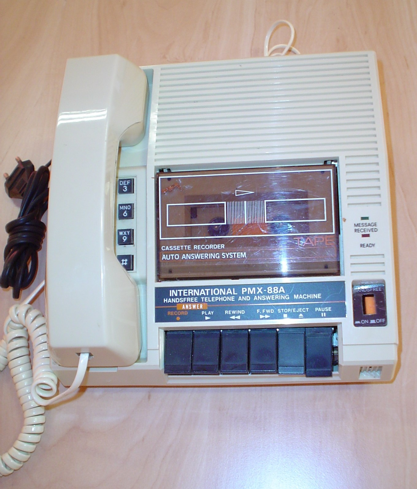 Kombina telefono (kun magnetofono)